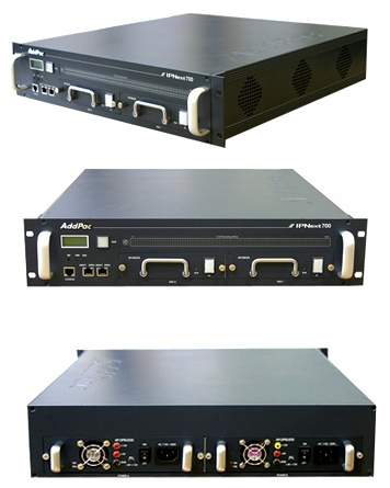 IP-PBX AddPac IPNext700 с поддержкой унифицированных коммуникаций (UC) для компаний крупного и среднего бизнеса (700 абонентов)